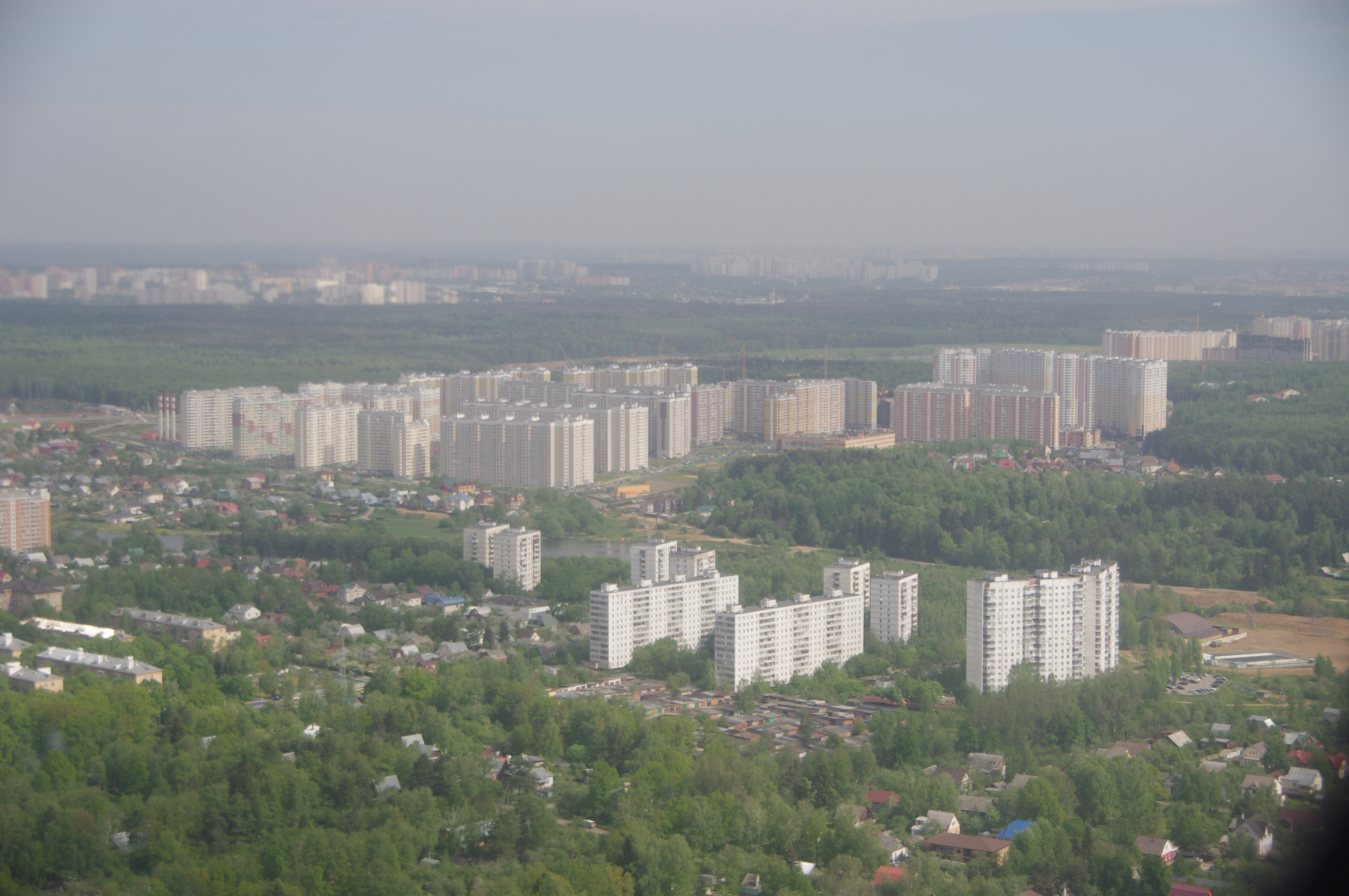 Вид из самолёта ATR-72 по маршруту Внуково - Стригино